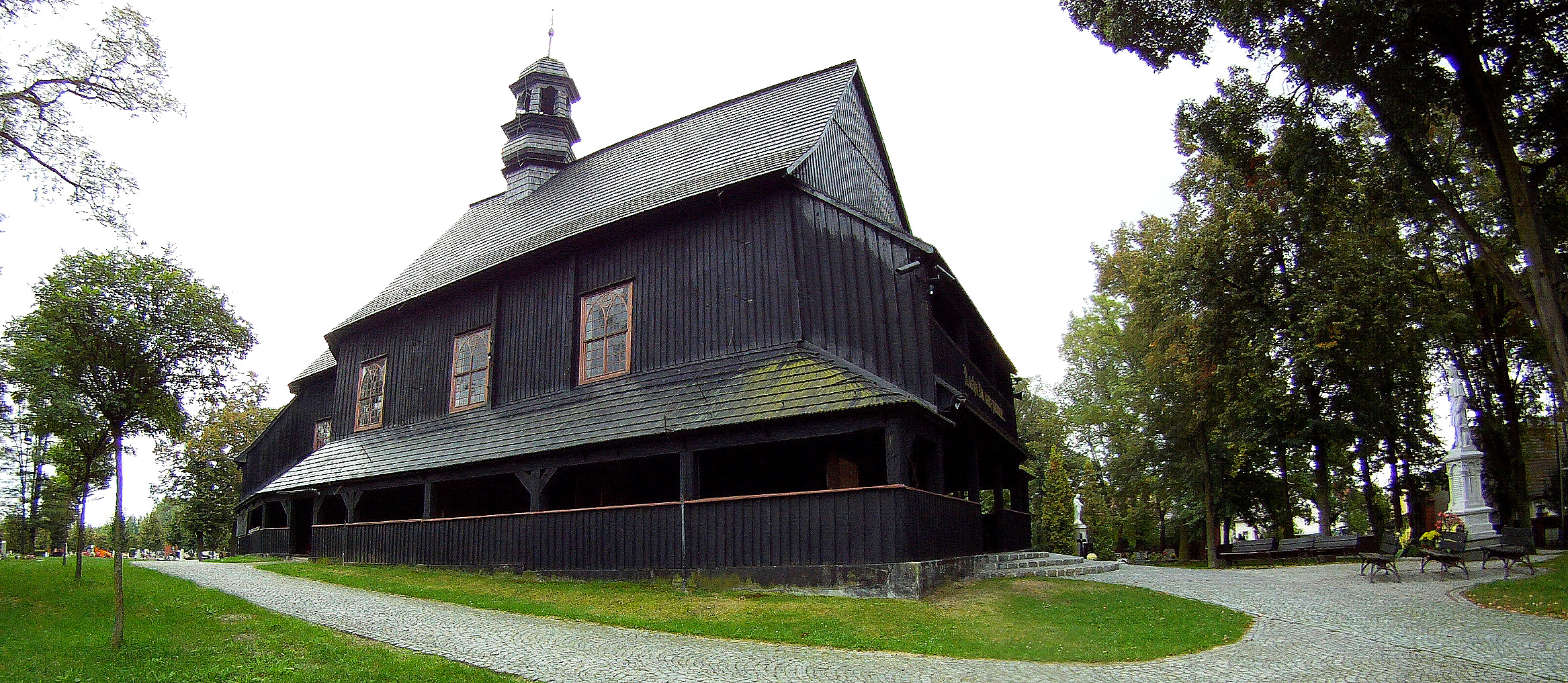 Dobrzeń Wielki - kościół odpustowy pw. św. Rocha (1658, 1752, 1928, 1958 i 2006)